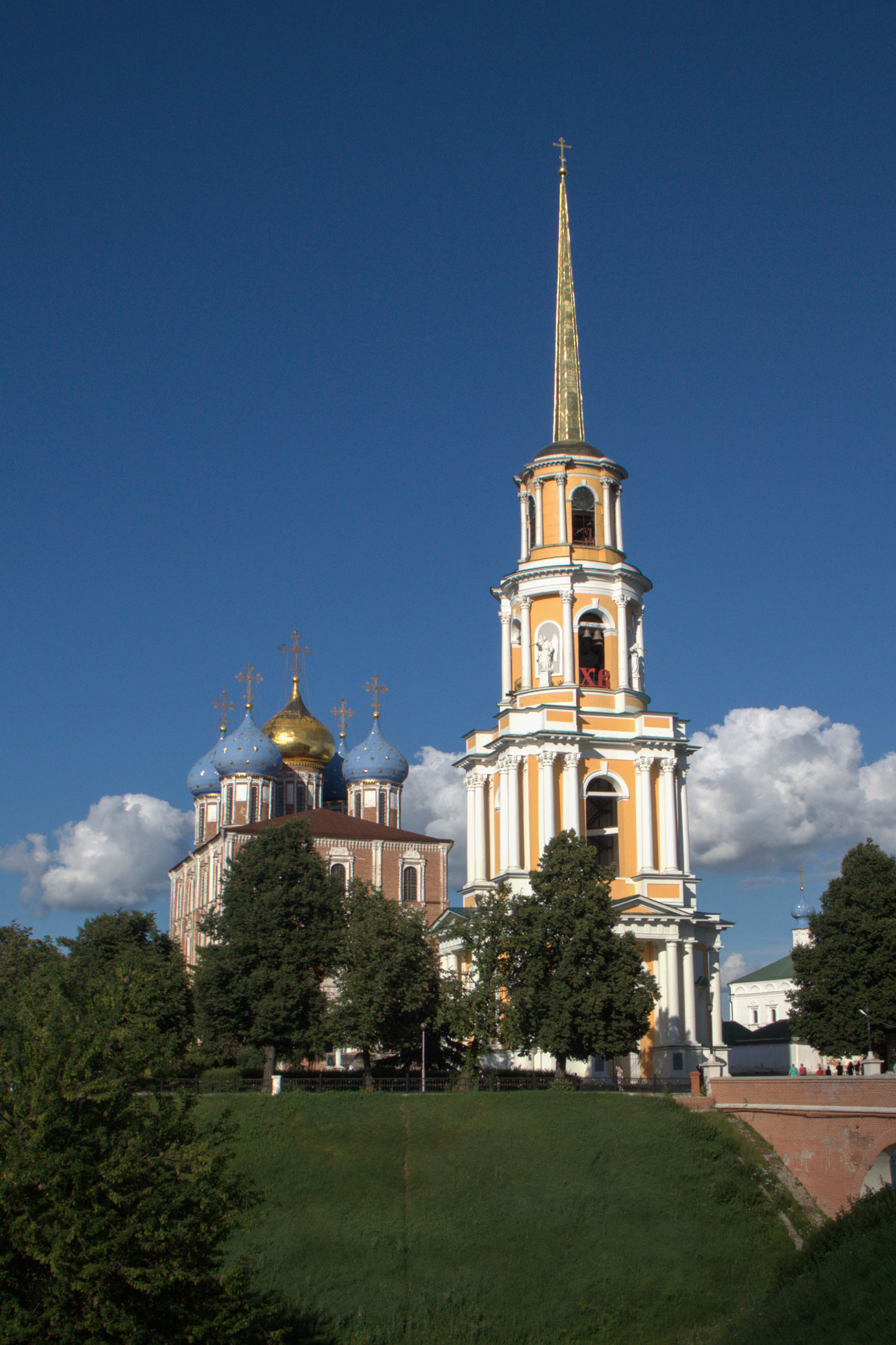 Успенский собор и колокольня, Рязанский кремль